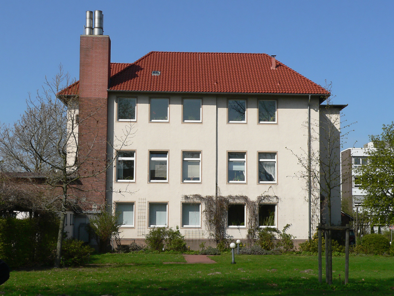 Ehemaliges Judenhaus in der Gartenbauschule